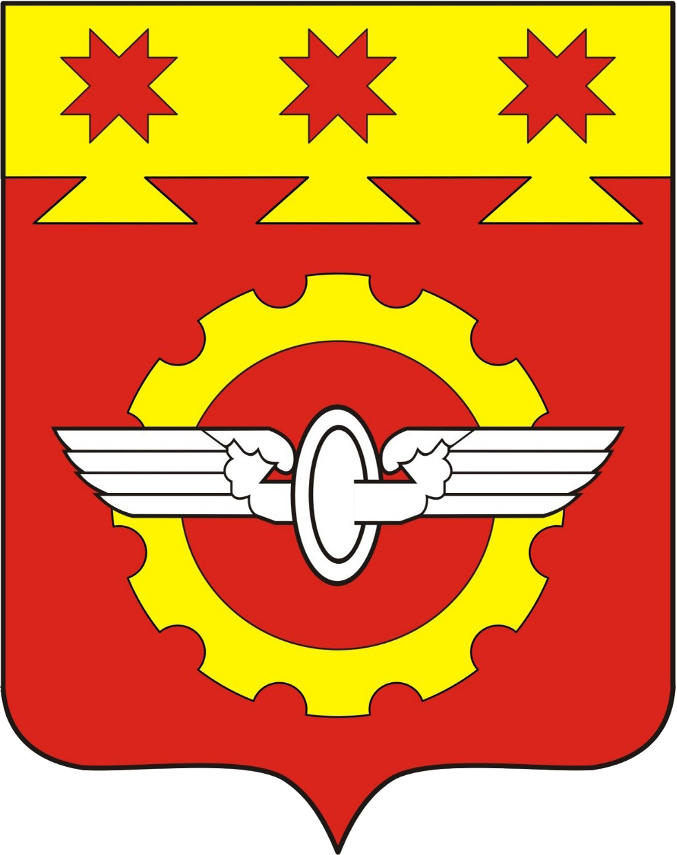 Герб Канаша 2017 года. В червлёном поле с золотой, уширенно-зубчатой главой, обременённой тремя червлёными косыми вырубными крестами, золотое зубчатое, с полукруглыми просветами между зубцами, кольцо, поверх которого серебряное окрылённое железнодорожное колесо.